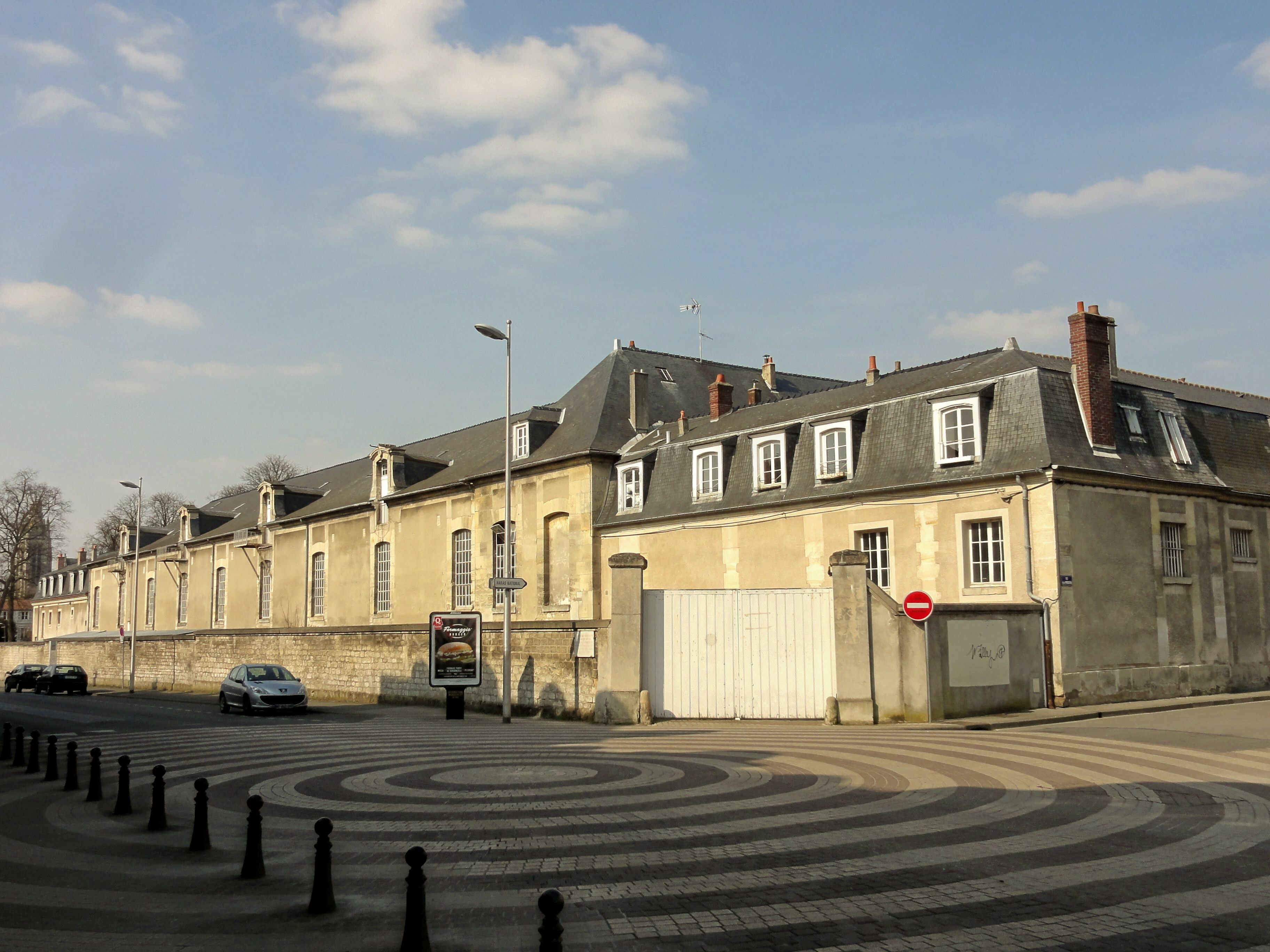 Haras national, rue Saint-Lazare.